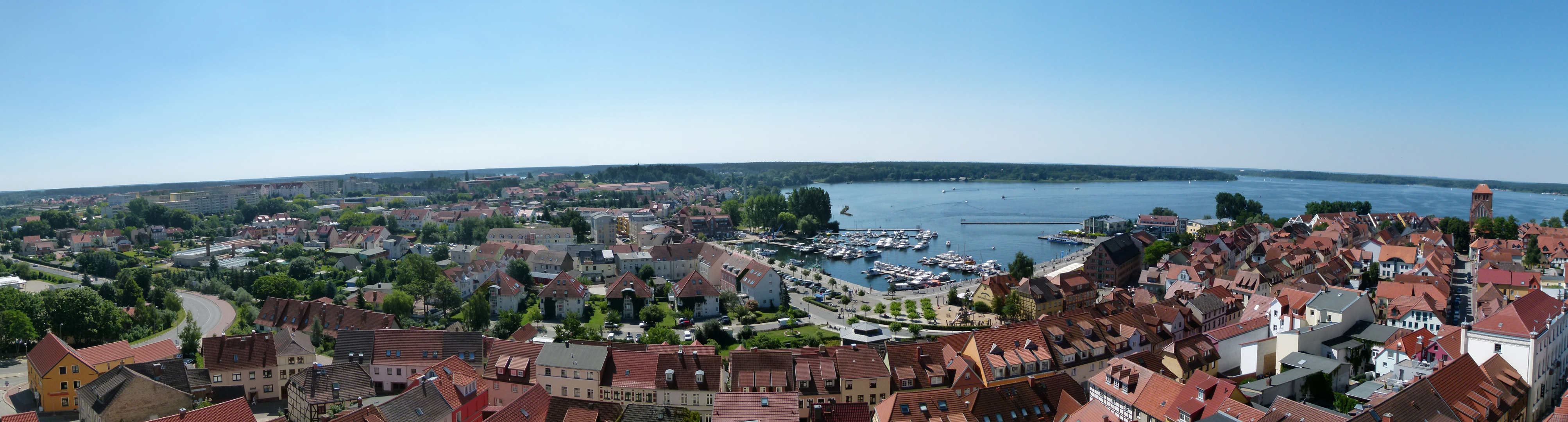 Aufgenommen vom Turm der Marienkirche in Waren(Müritz)